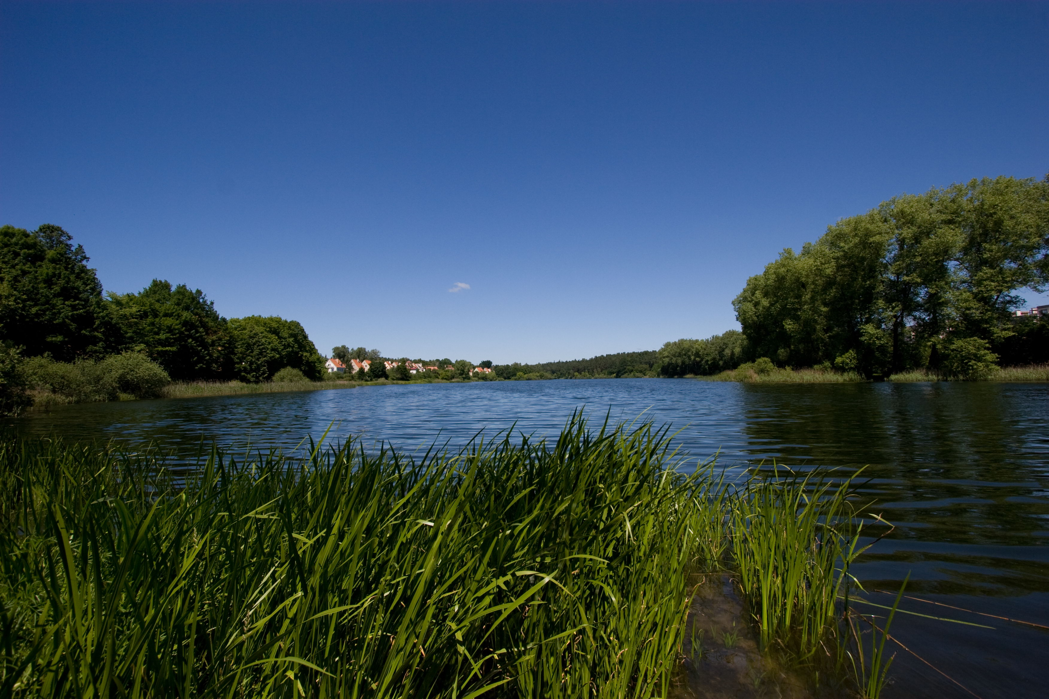 Jezioro Długie w Olsztynie